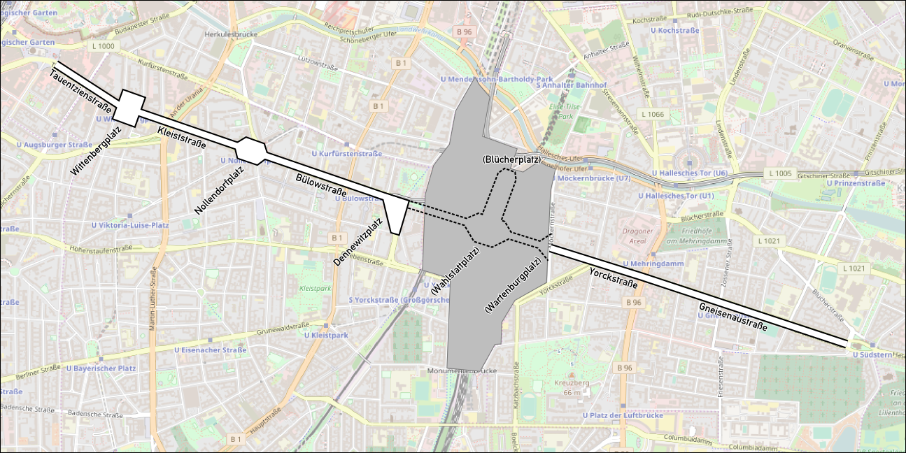 Berlin, Karte des Generalszuges. This map may be incomplete, and may contain errors. Don't rely solely on it for navigation.